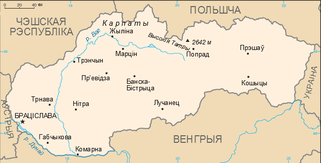 Карта Славакіі